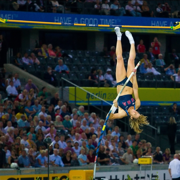 Chelsea Johnson - Überraschungszweite im Stabhochsprung